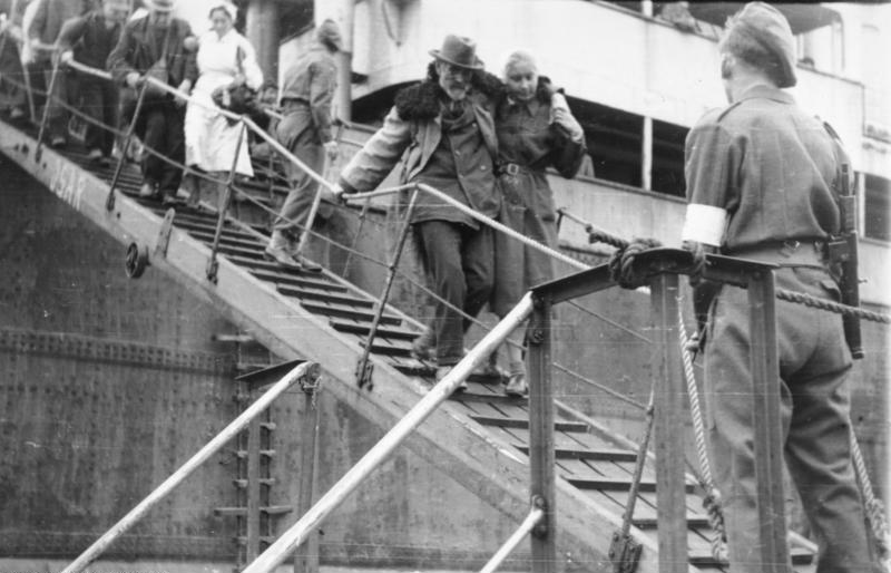 Ausschiffung von Flüchtlingen aus Ostpreußen